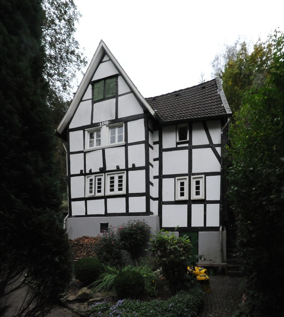 Burg, Eschbachstraße 22